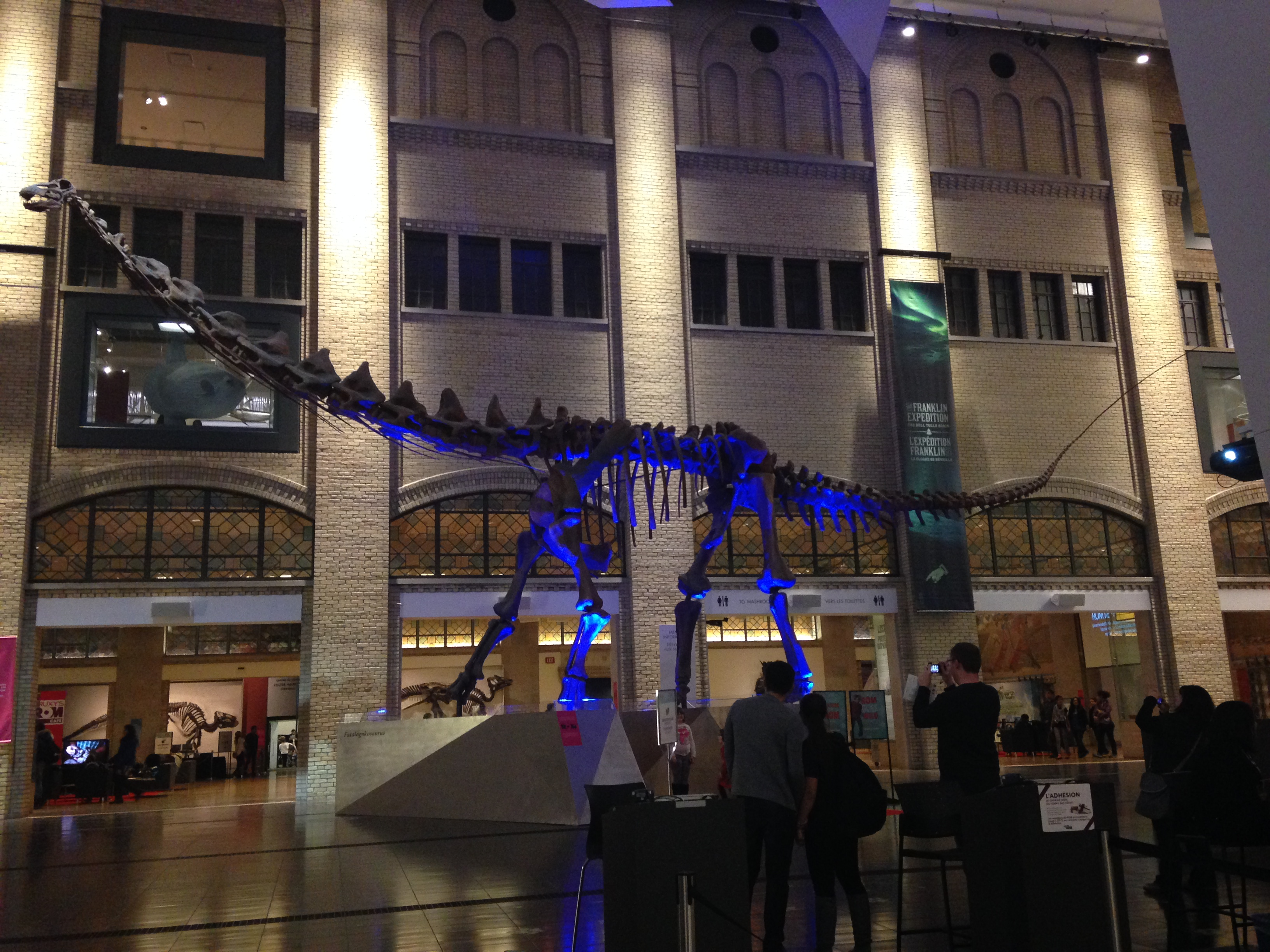 Blue Dinosaur Royal Ontario Museum